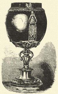 Az állítólagos, kókuszdióhéjra épülő székely áldozópohár Orbán Balázs: Székelyföld leírása (1868) c. könyvéből. (XIII. Fel-Csík)